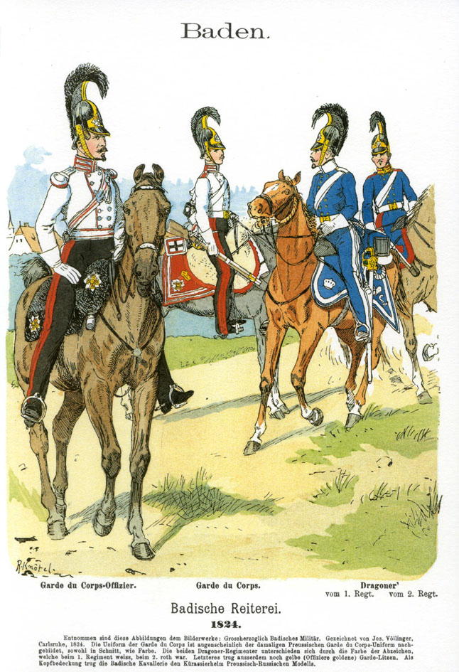 Иллюстрация Рихарда Кнотеля